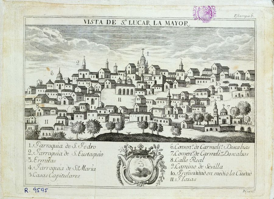 Grabado de Sanlúcar la Mayor